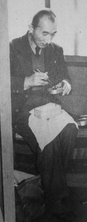 青山杉作